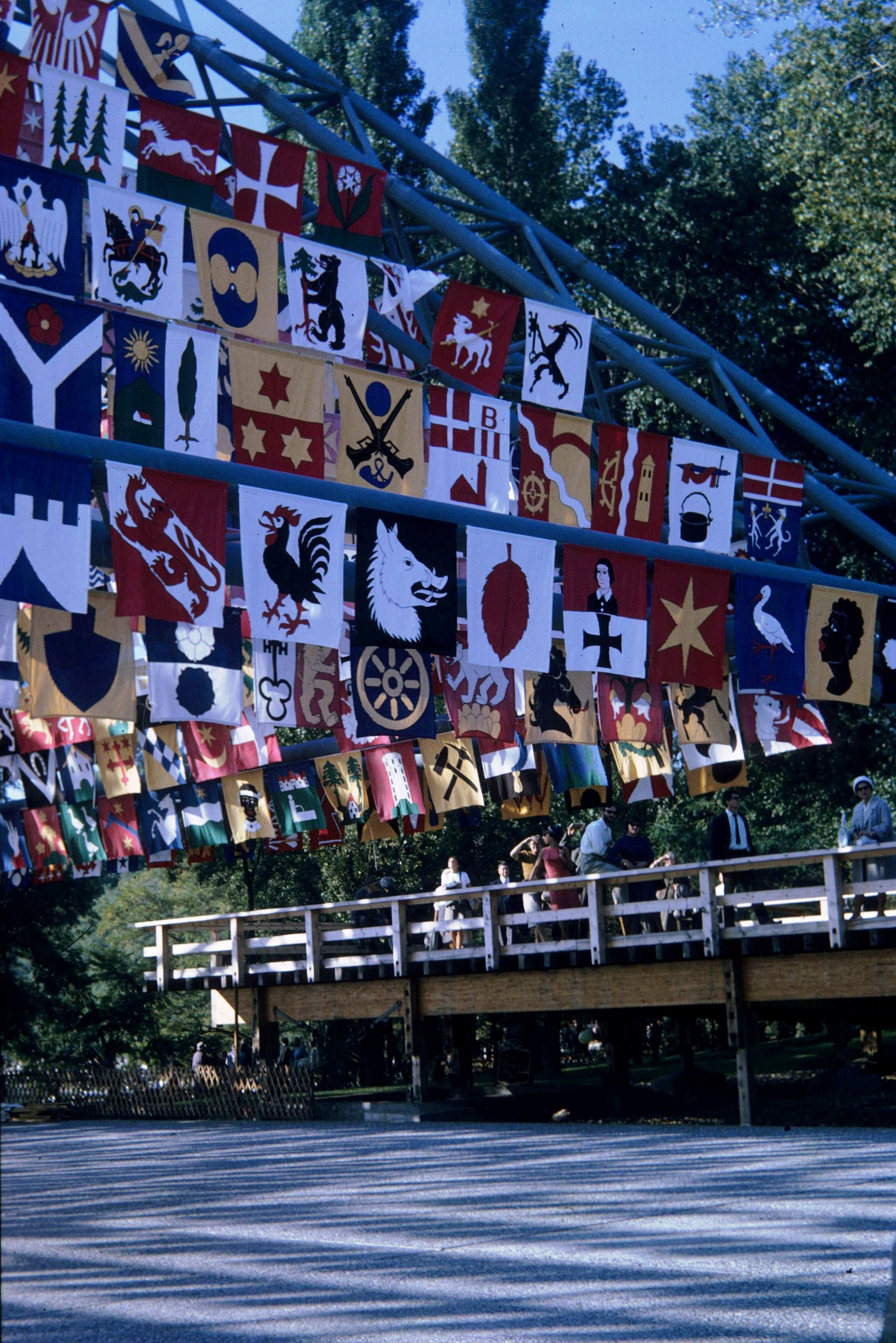 Expo 64, Lausanne VD, Schweiz